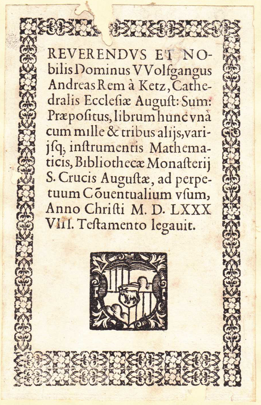 Ex libris, Augustinerchorherrenstift Heilig Kreuz, Augsburg; Wolfgang Andreas Rem